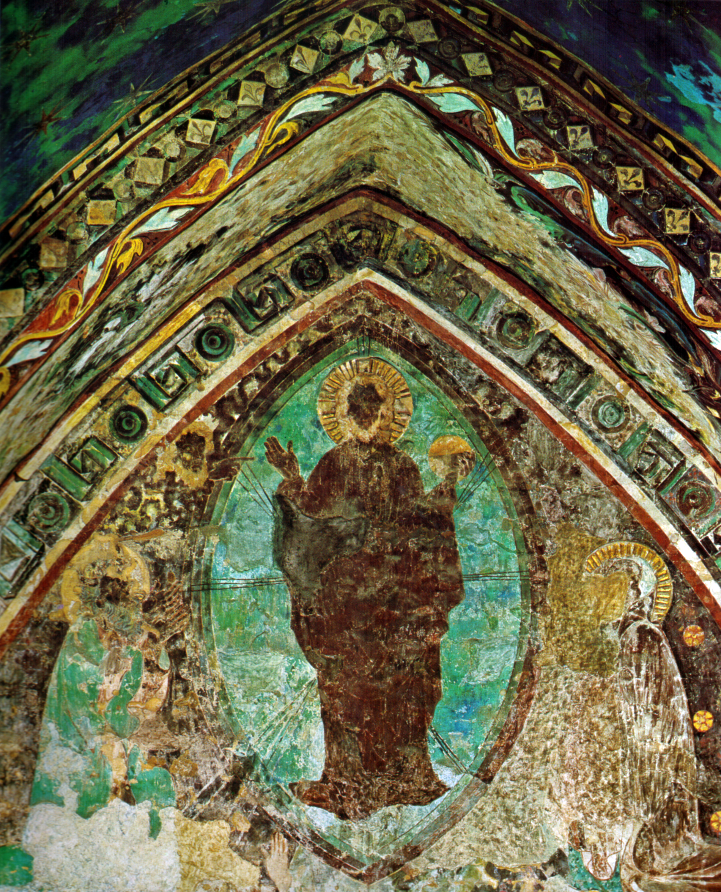 Maestro Oltremontano, trasfigurazione (dettaglio)